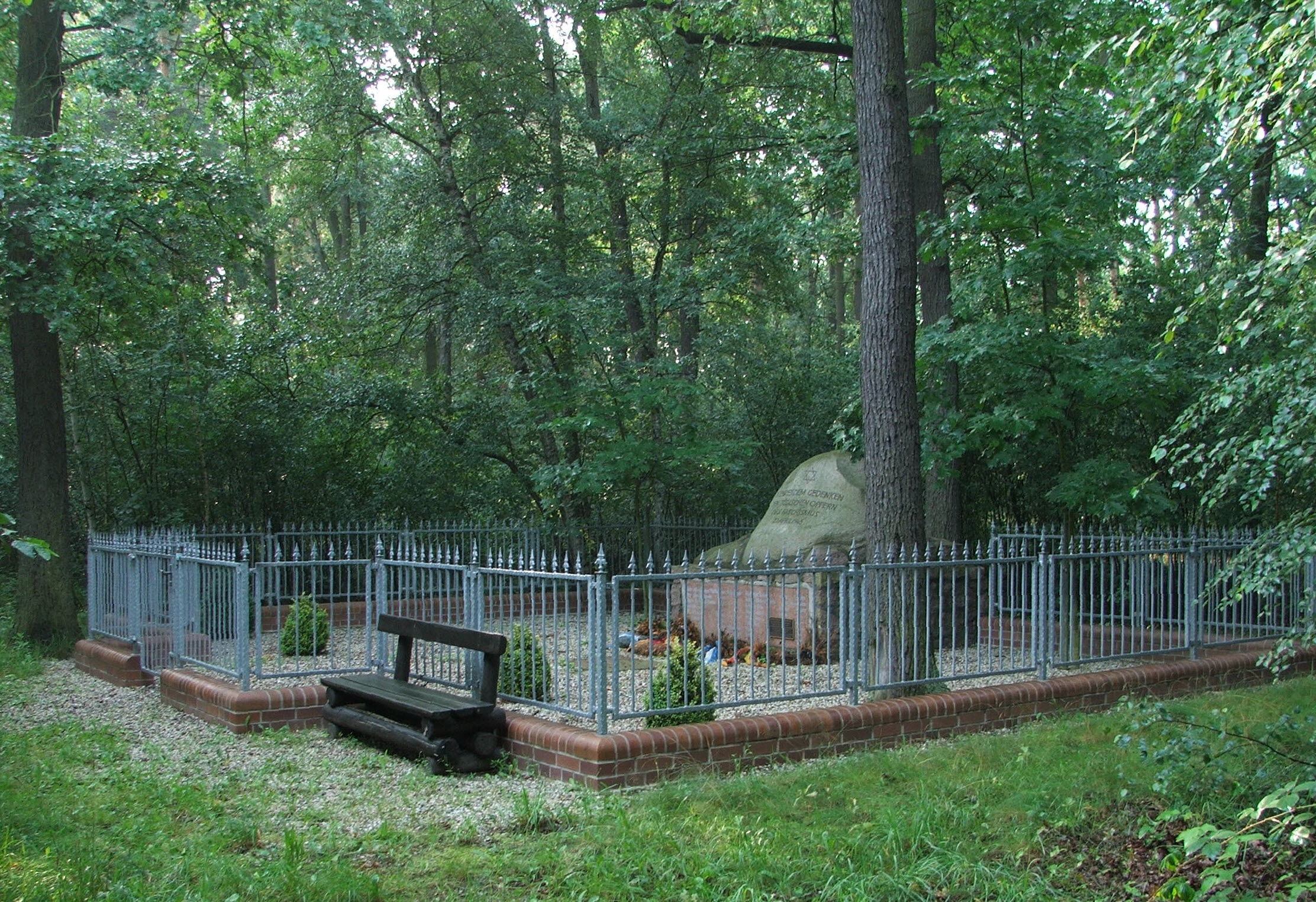 Grabmal am Kilometer 101,6 bei Langennaundorf